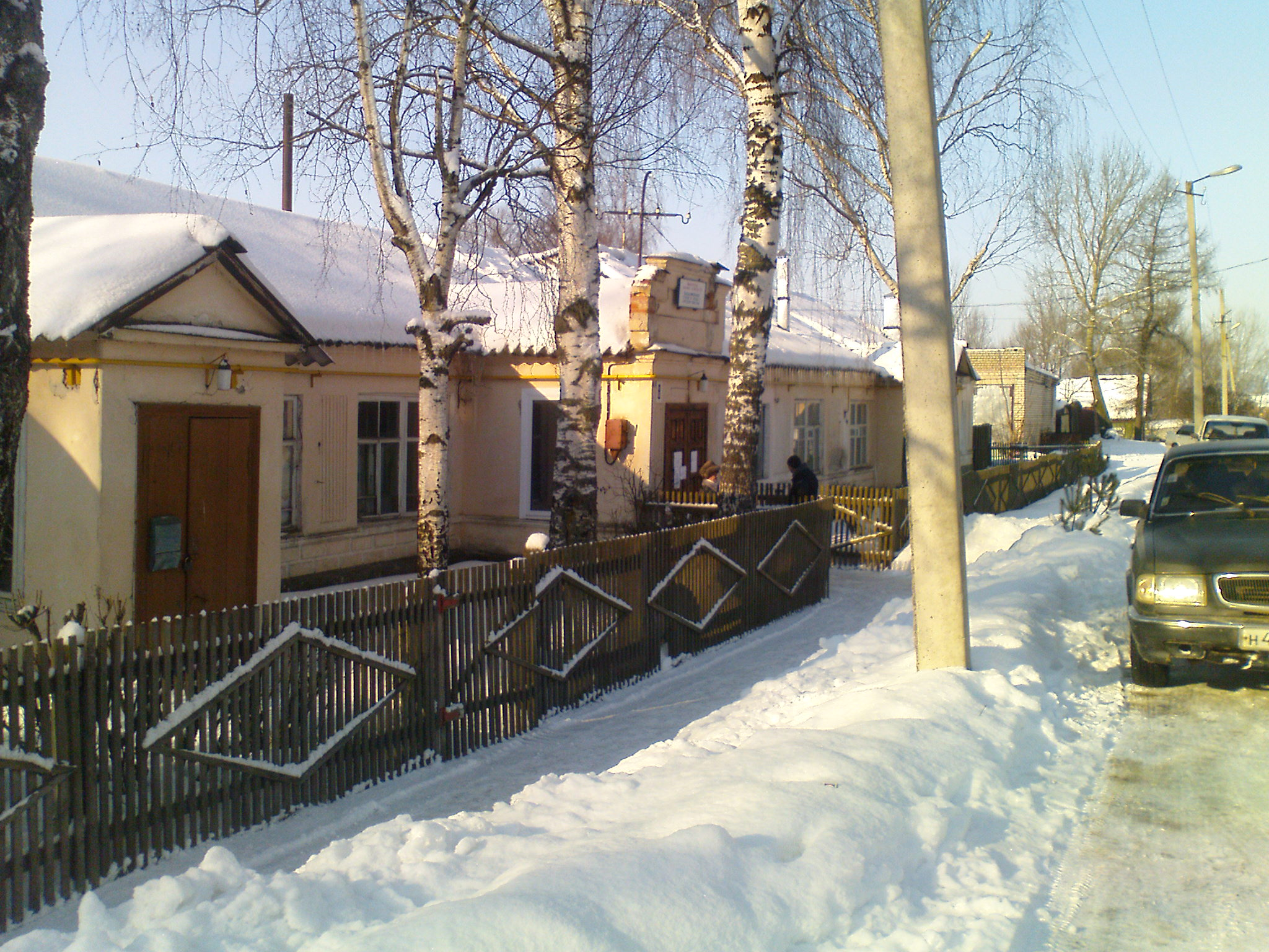 Bezhetsk, Tverskaya oblast', Russia